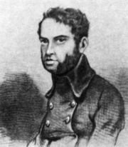 Дмитрий Иванович князь Долгоруков (1797 - 1867) — российский дипломат, сенатор